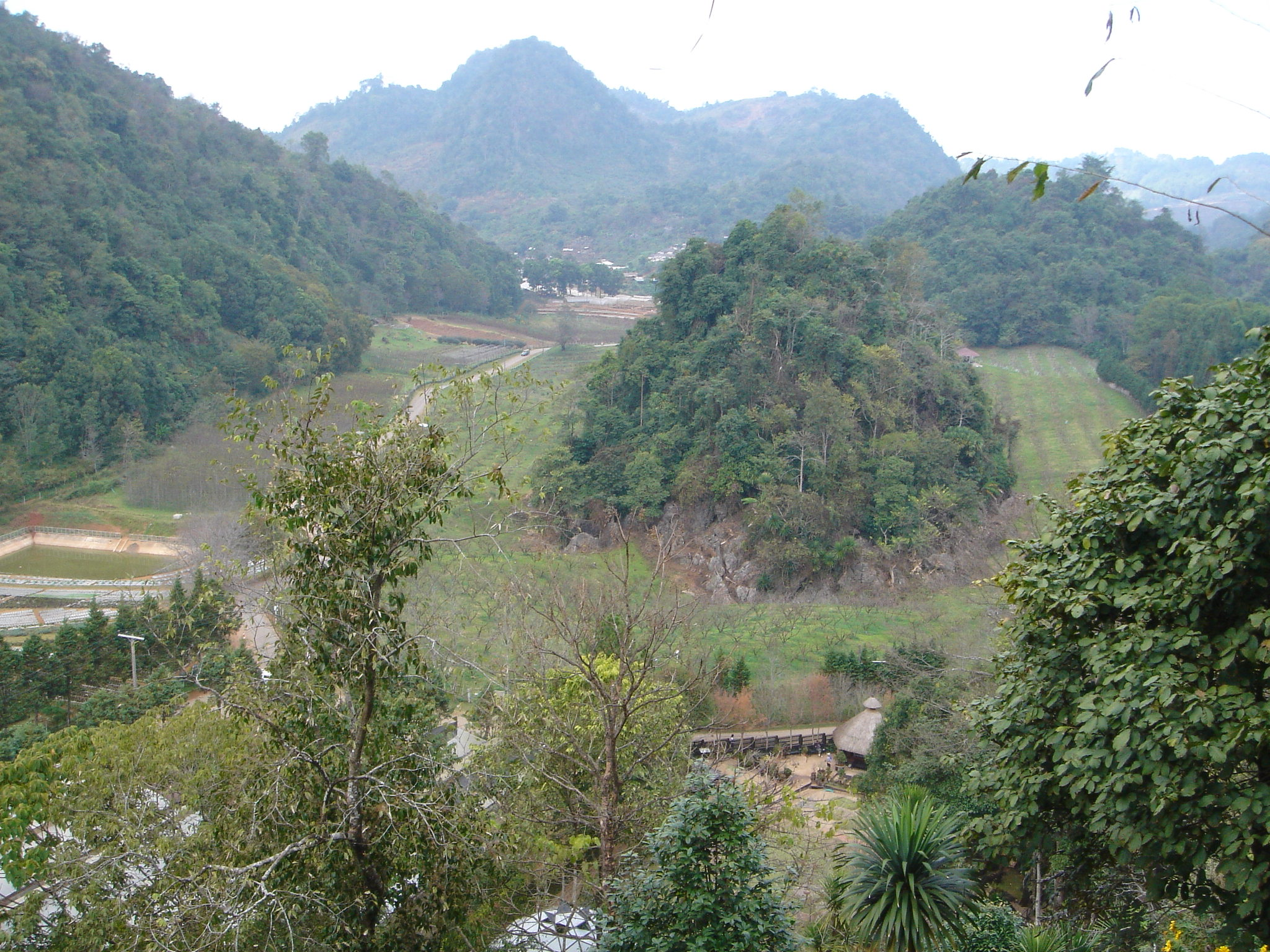 Ang Khang Royal Agricultural Station